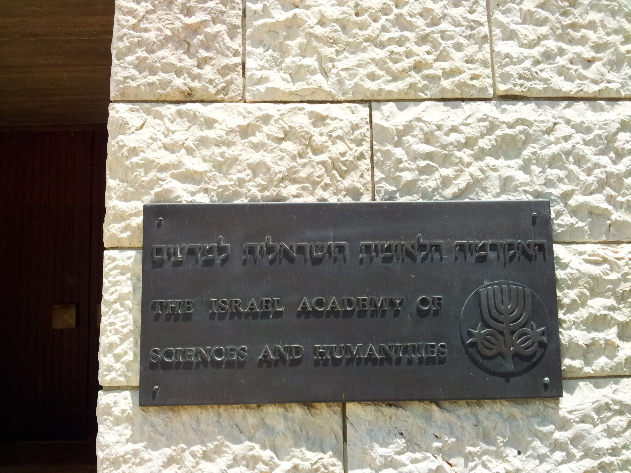 שלט בכניסה אל האקדמיה הלאומית למדעים בירושלים